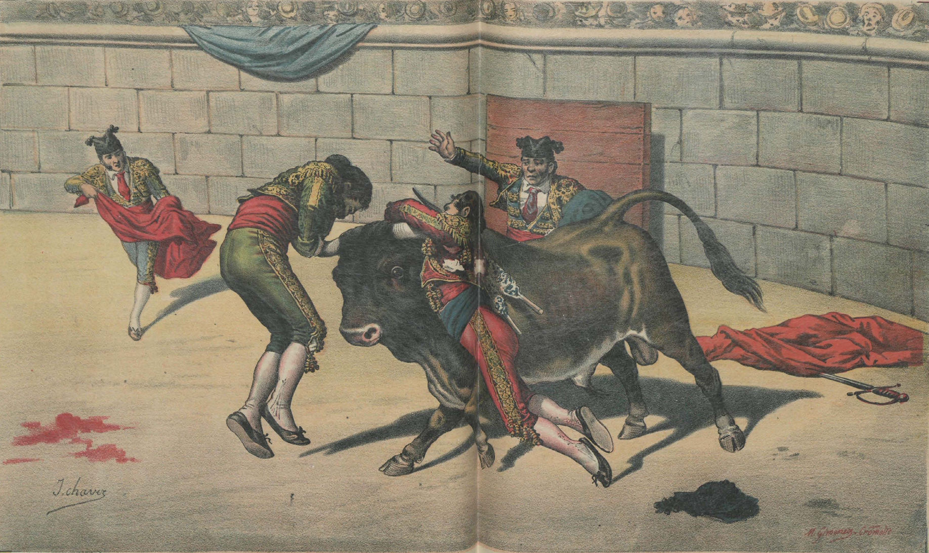 Cogida de Curro Guillén, de José Chaves.